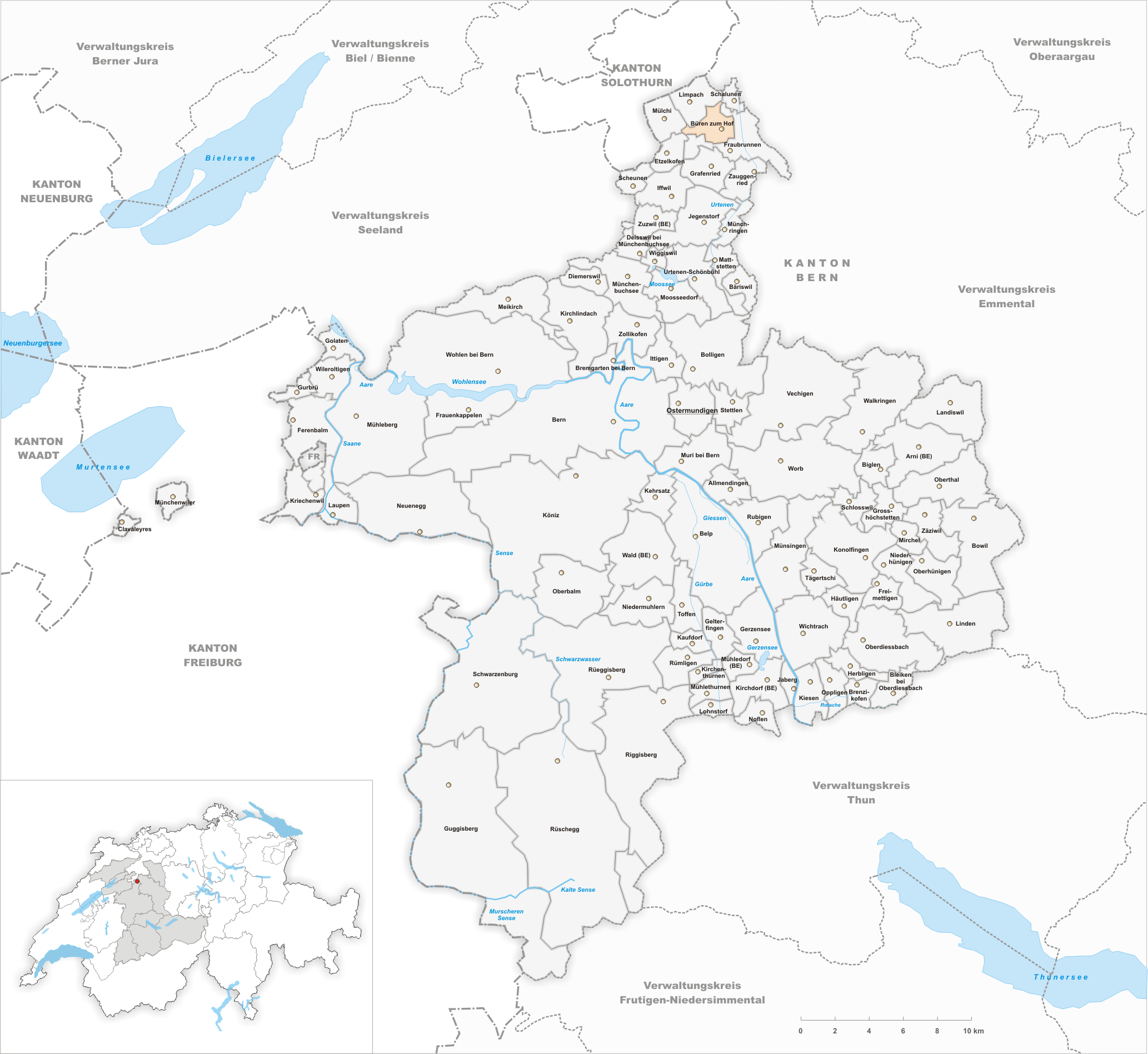 Municipality Büren zum Hof